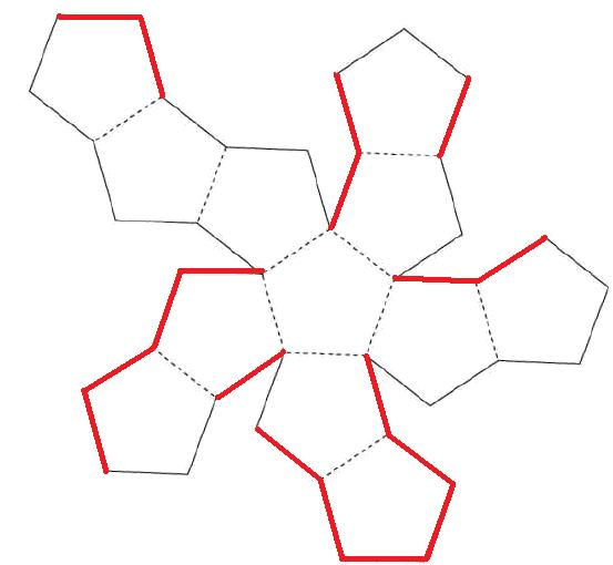 Síť dodekaedru, červené čáry jsou místa, kde musí být "výčnělky" aby to drželo.